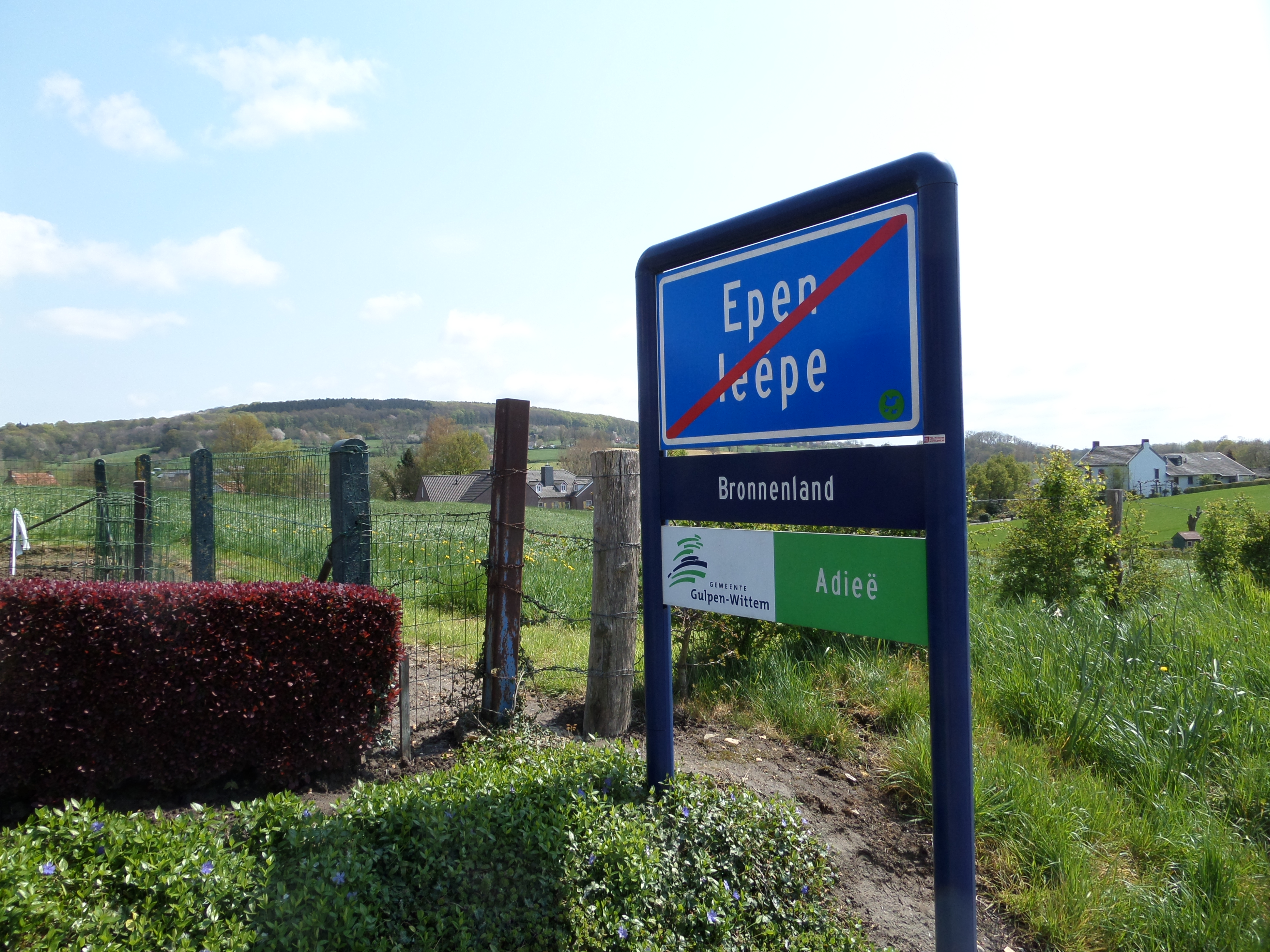 Plaatsnaambord van Epen in de Nederlandse gemeente Gulpen-Wittem, provincie Limburg